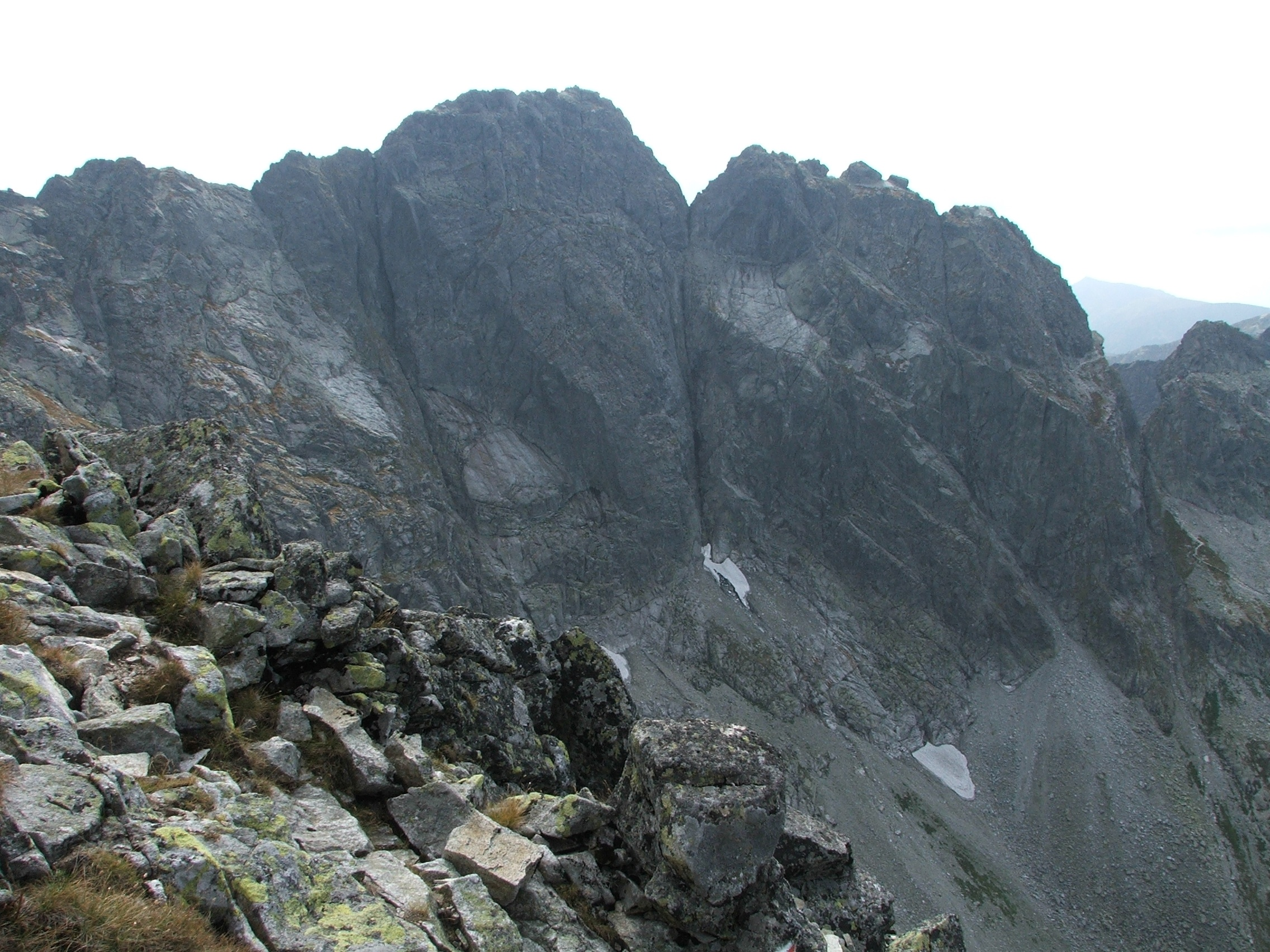 Widok z Orlej Perci na Kozi Wierch